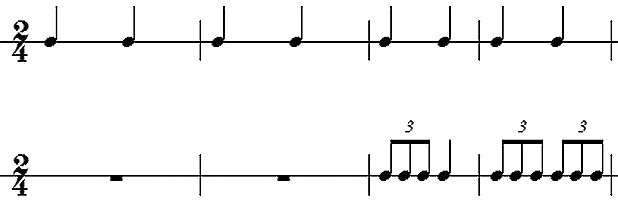 Triolentakte